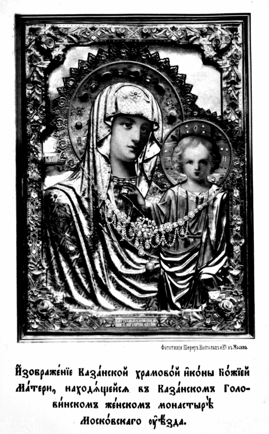 Икона Казанской Божьей Матери работы А. В. Васильева из Казанского Головинского монастыря.